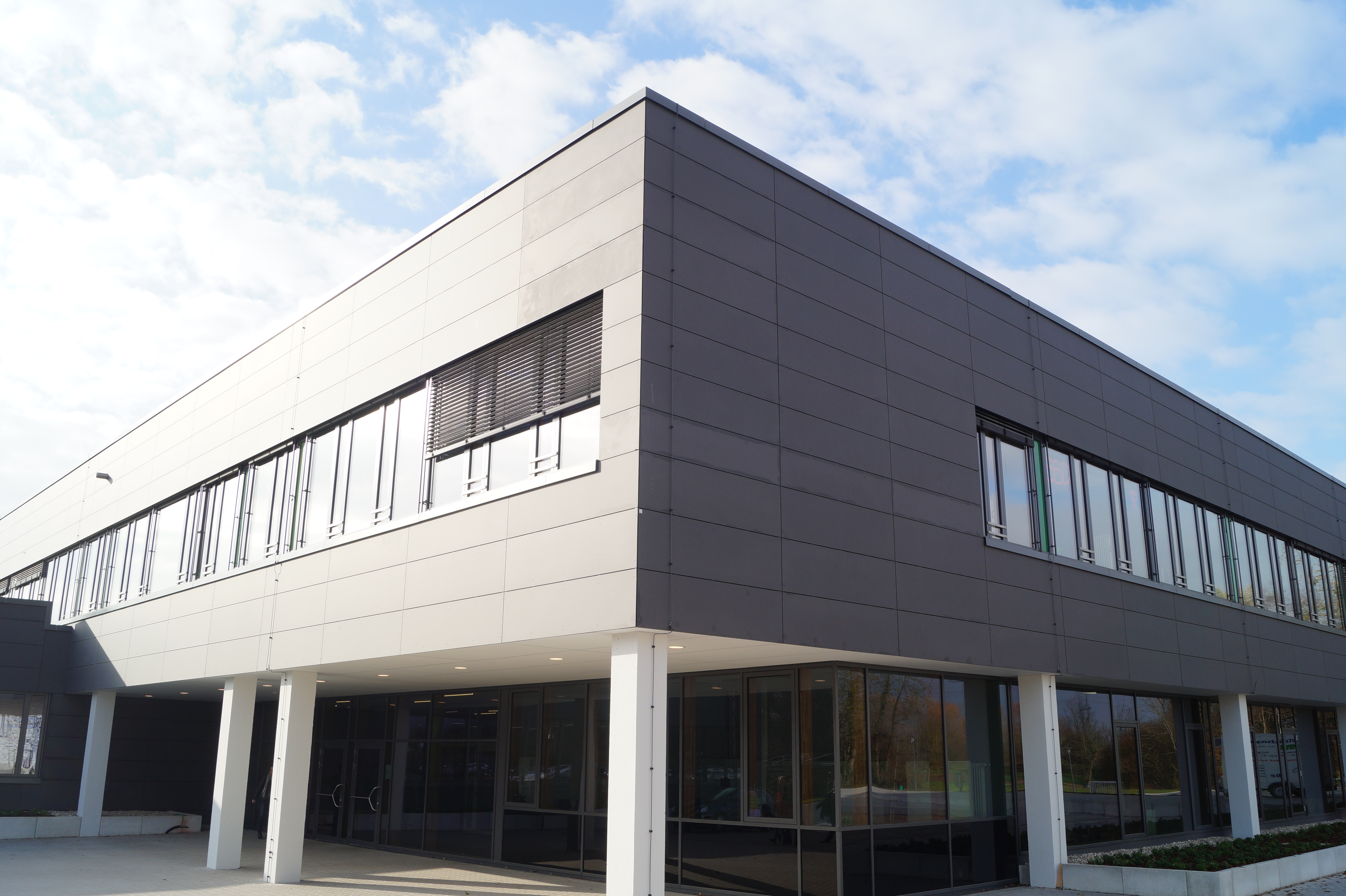 Einweihung Schulzentrum - Tag der offenen Tür, 18.11.2017, 10 - 14 Uhr